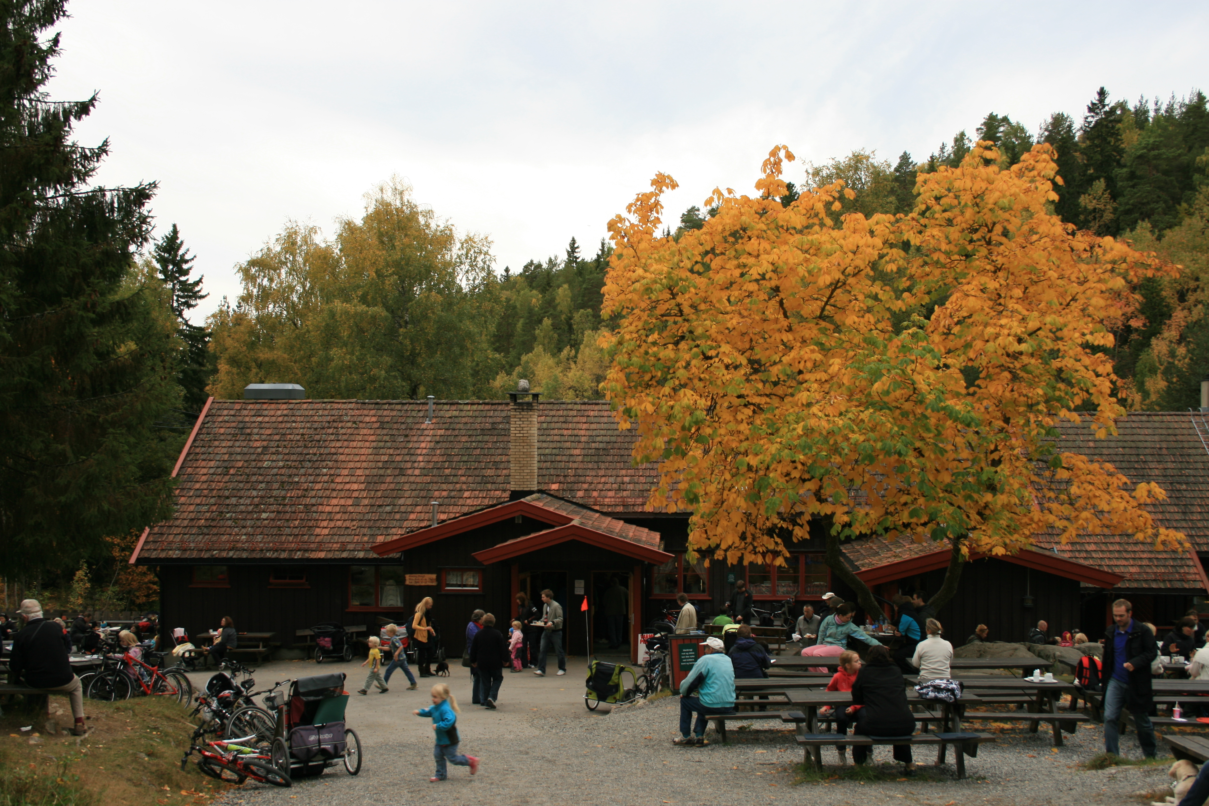 Rustadsaga sportstue ved Nøklevann, Oslo kommune